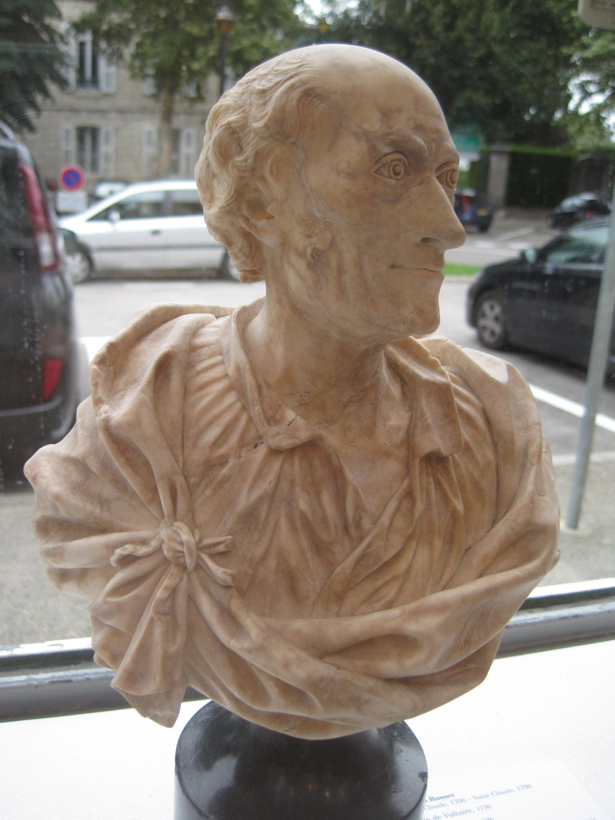 Musée des Beaux-Arts de Lons-le-Saunier - Albâtre - Buste de Voltaire - par Joseph Rosset - 1770